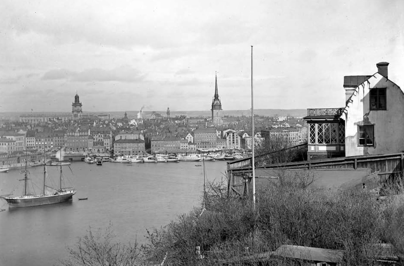 Rangströmska gården med vy över Riddarfjärden